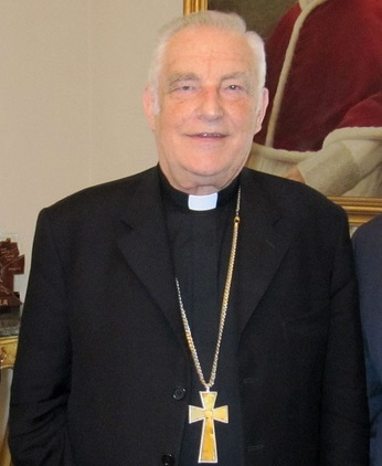 Le cardinal polonais Mgr Zenon Grocholewski lors d'une rencontre avec le recteur espagnole Ignacio Sánchez en 2010.